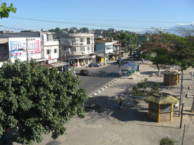 Visão do bairro de Coelho da Rocha, em São João de Meriti, RJ